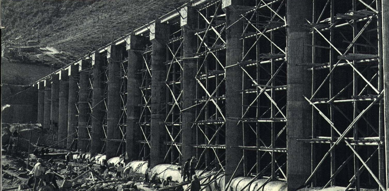 1965-6 1965年 东江深圳水利工程 妈滩拦河闸坝